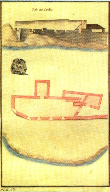 "Forte da Greta", s/d, autor desconhecido, Arquivo Histórico Militar, Lisboa. in MARTINS, José Salgado, "Património Edificado da Ilha Terceira: o Passado e o Presente". Separata da "Atlântida", vol. LII, 2007. p. 33. Também integrante da "Colecção de Plantas e Alçados de 32 Fortalezas dos Açores, por Joze Rodrigo d'Almeida em 1830", José Rodrigo de Almeida, 1830 (c.) GEAEM (346-1-8A-96), Lisboa, Portugal.